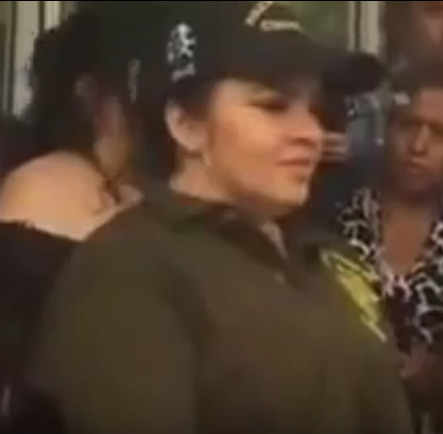 Nestora Salgado. Momento en que es liberada y sus oficiales se ponen a las ordenes de la comandanta.